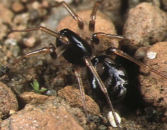 female Mallinella shimojanai from Okinawa.